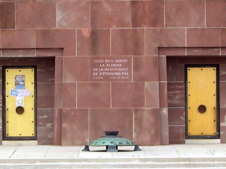 Description = Croix de lorraine au mémorial du Mont-Valérien *Source =Photo taken by Remi Jouan *Date =Septembre 2006 *Author =Remi Jouan